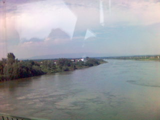 Fluss Sava in Bosanska Gradiška, Bosnien und Herzegowina. Grenzübergang zwischen BiH und Kroatien, links die kroatische Seite; von der Brücke aus fotografiert, mit einem SonyEricsson K700i. River Sava in Bosanska Gradiška, Bosnia and Herzegovina. Filmed from the bridge on the border between Bosnia and Croatia, on the left side Croatia.